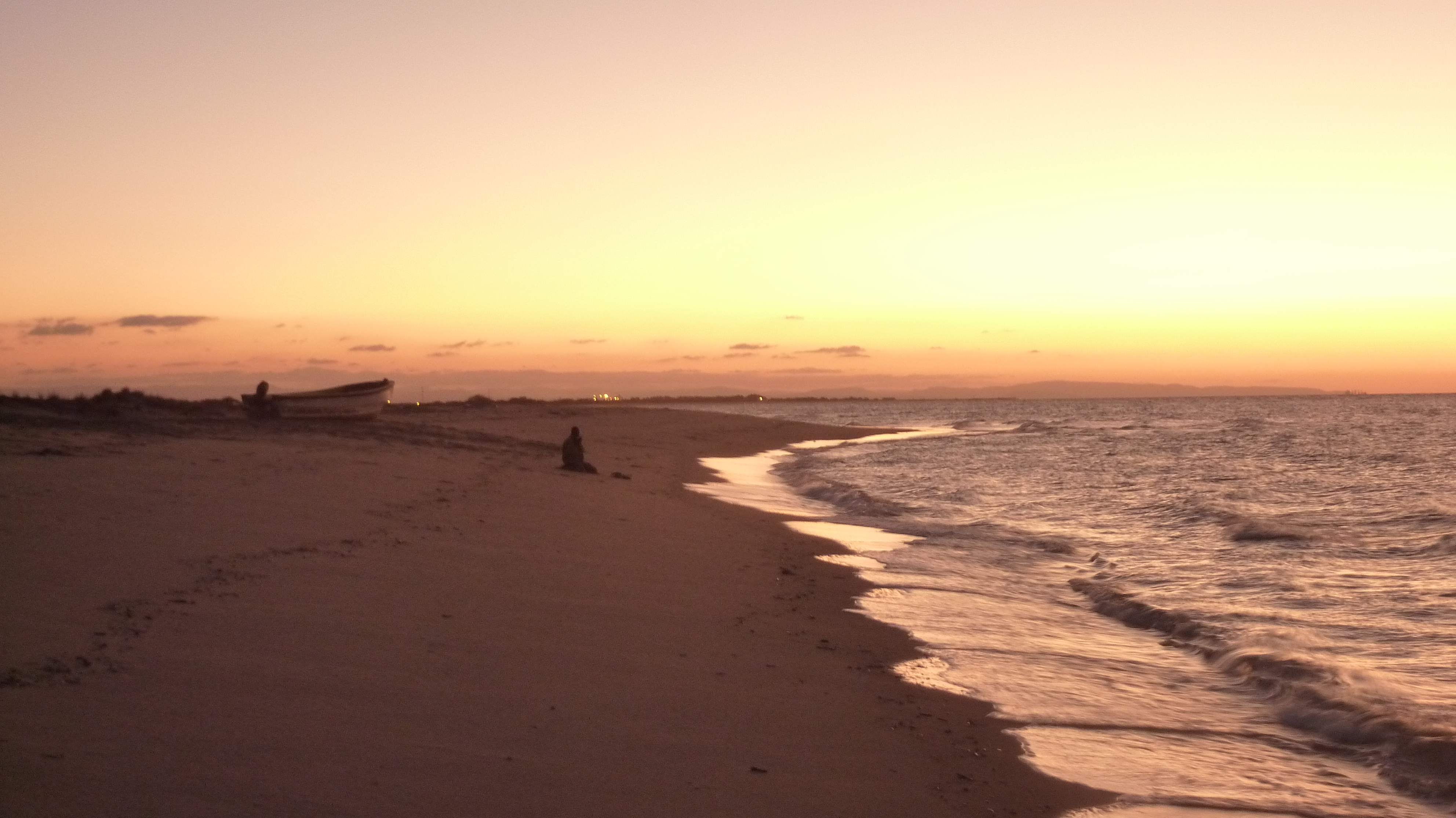 Berbera, Somaliland